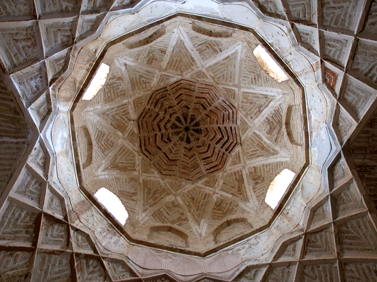 این کلیسا در کنار روستای سهرل در جاده ای فرعی از مسیر جاده مرند تبریز واقع شده است.